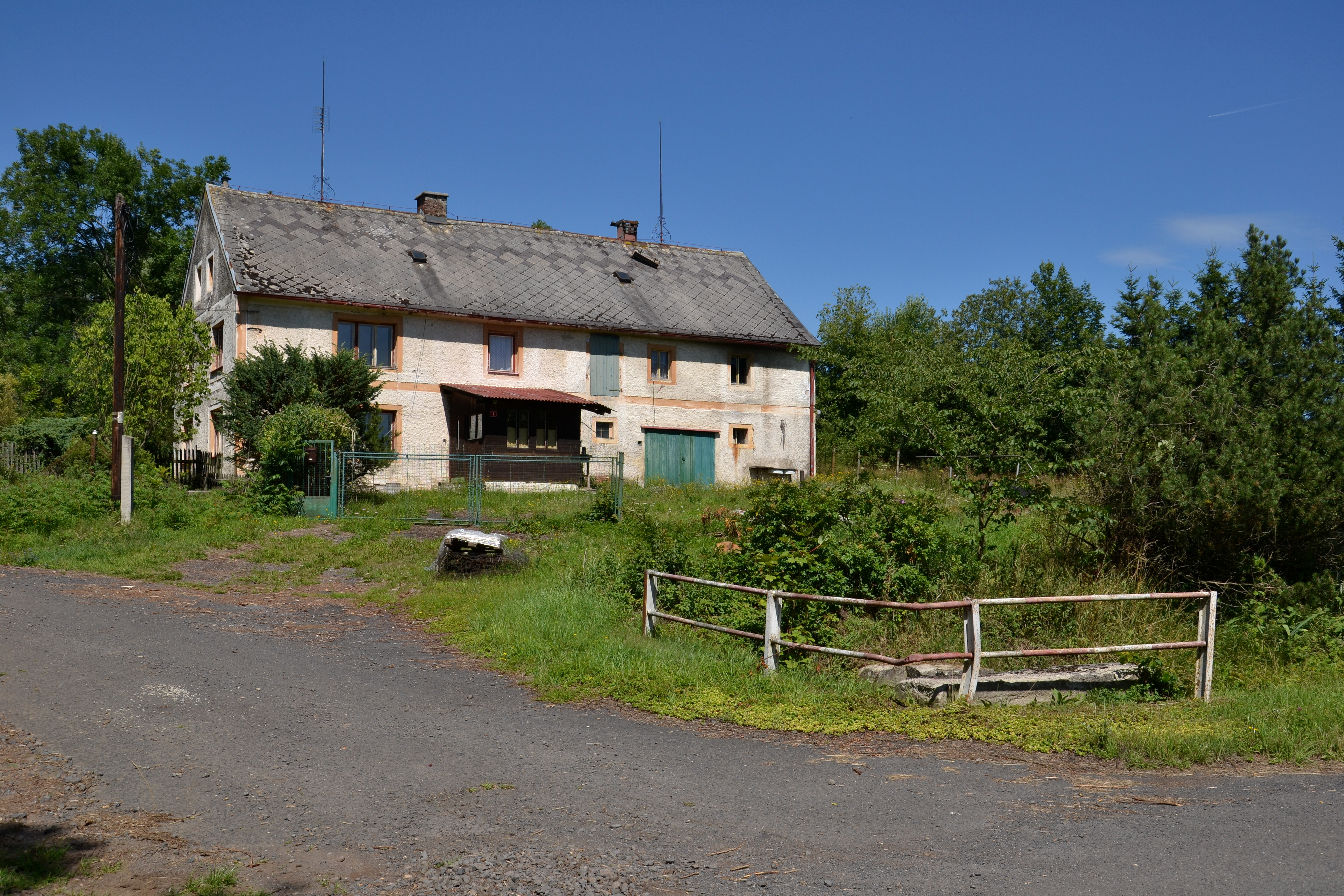 Dolní Valov – přední strana domu čp. 1